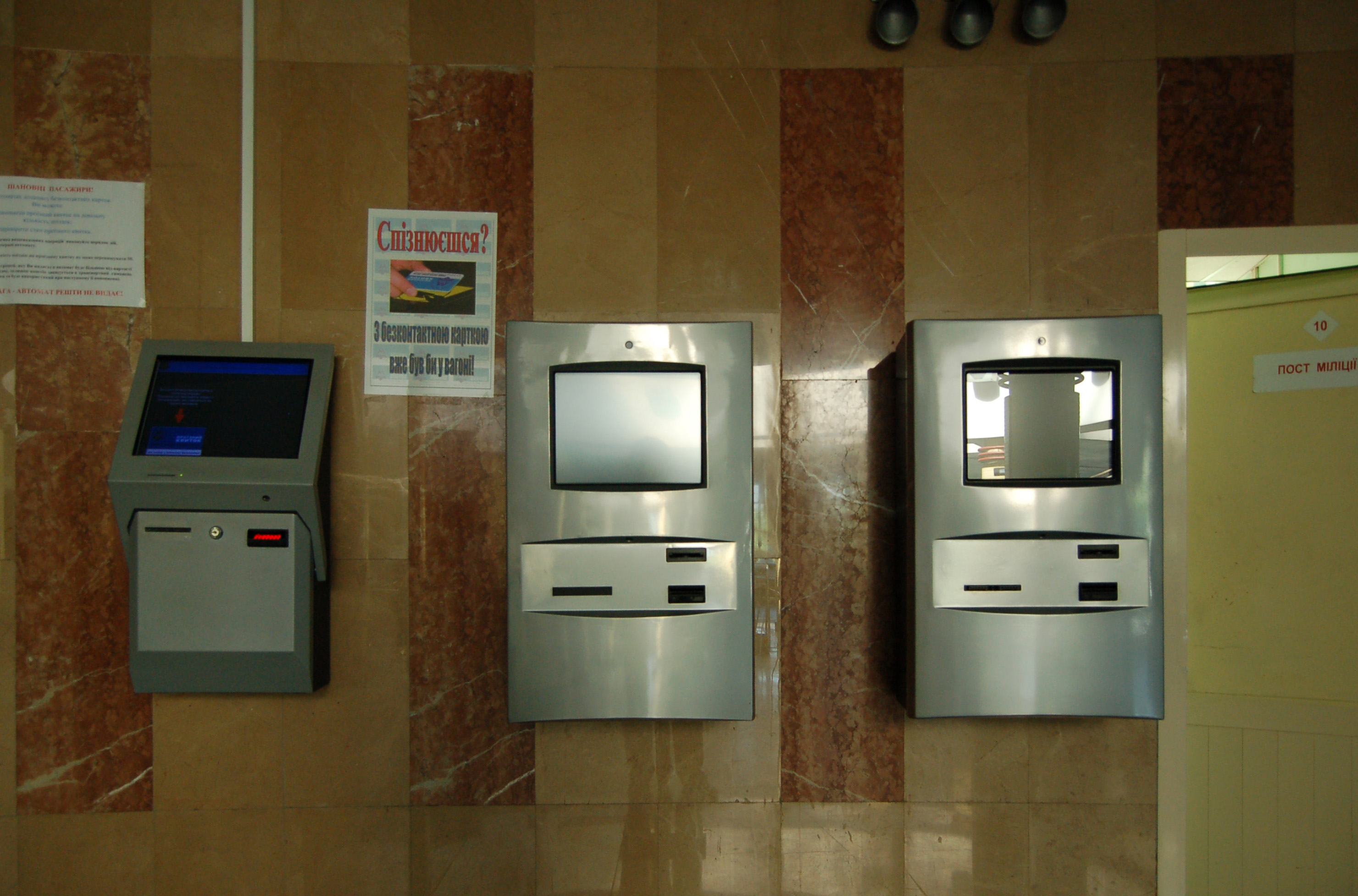 Cтанция метро «Сырец», автоматы пополнения бесконтактных карточек